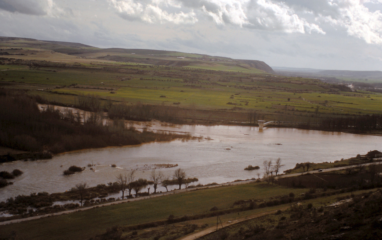 Desembocadura del río Lozoya en el Jarama durante los temporales de lluvia de febrero de 1.978